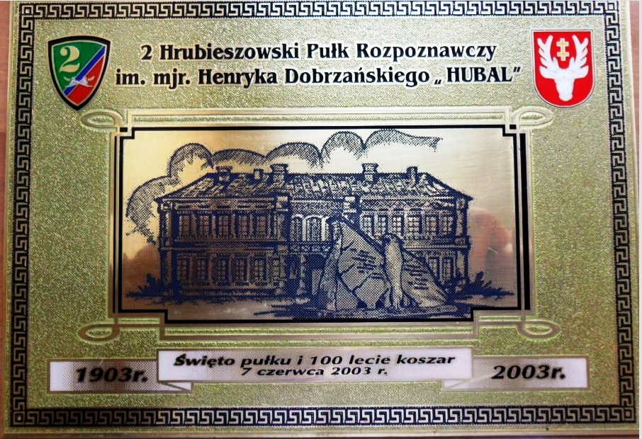 Pamiątkowa tabliczka